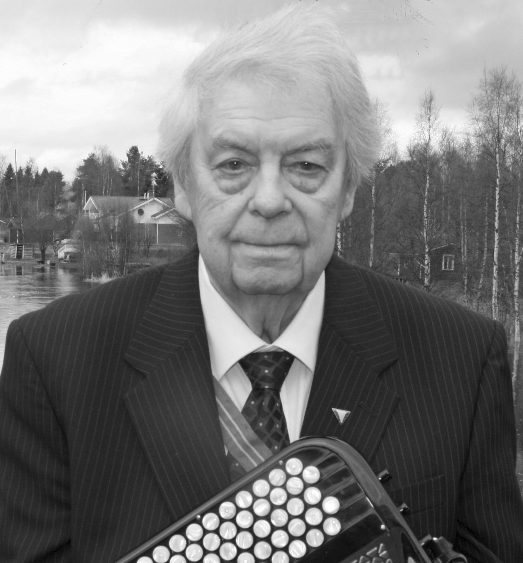 Jukka Ollila 90-vuotiaana 2016, Kuvaaja: Kari Mikkola